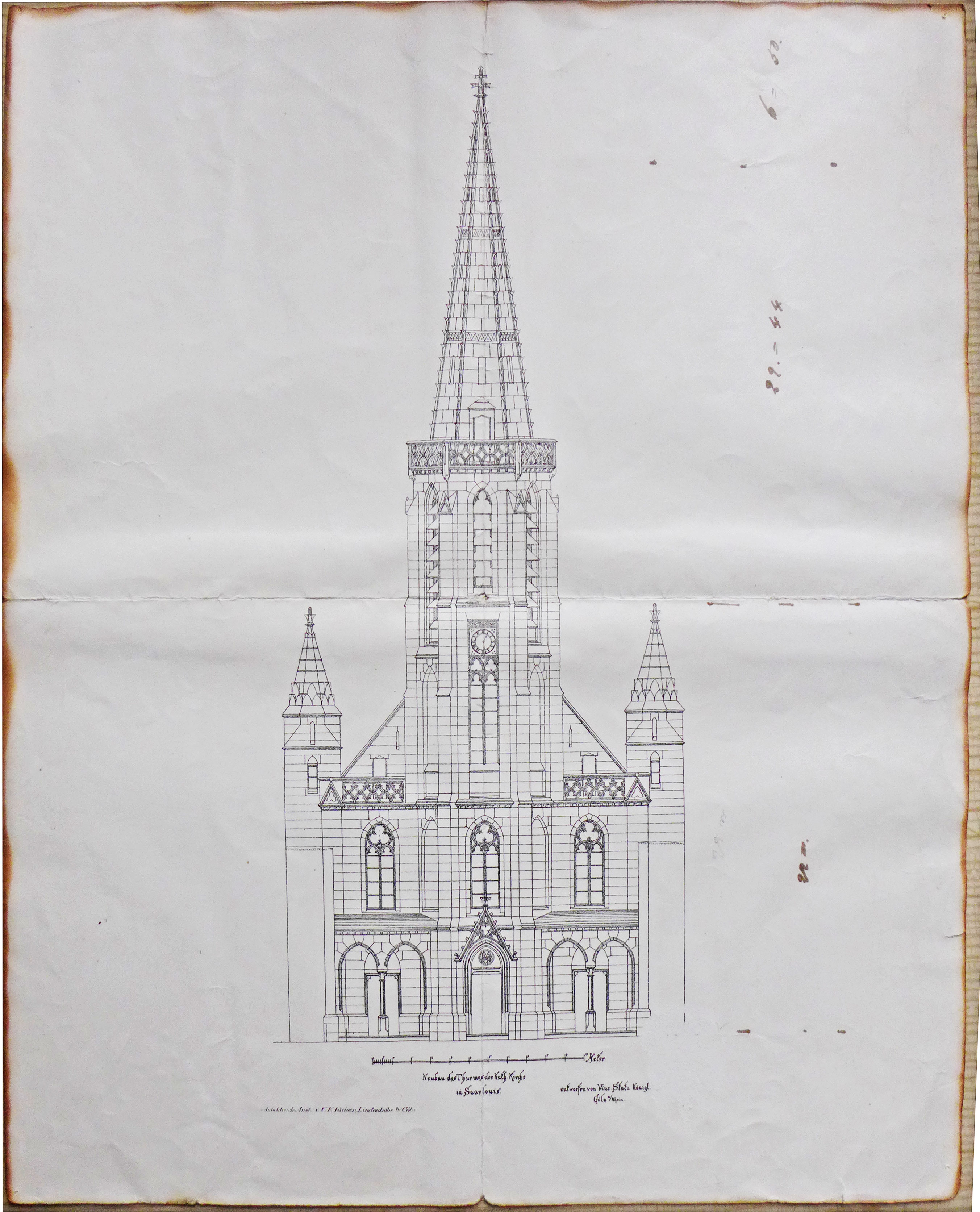 St. Ludwig (Saarlouis), Fassadenriss der neogotischen Turmfassade von Vinzenz Statz